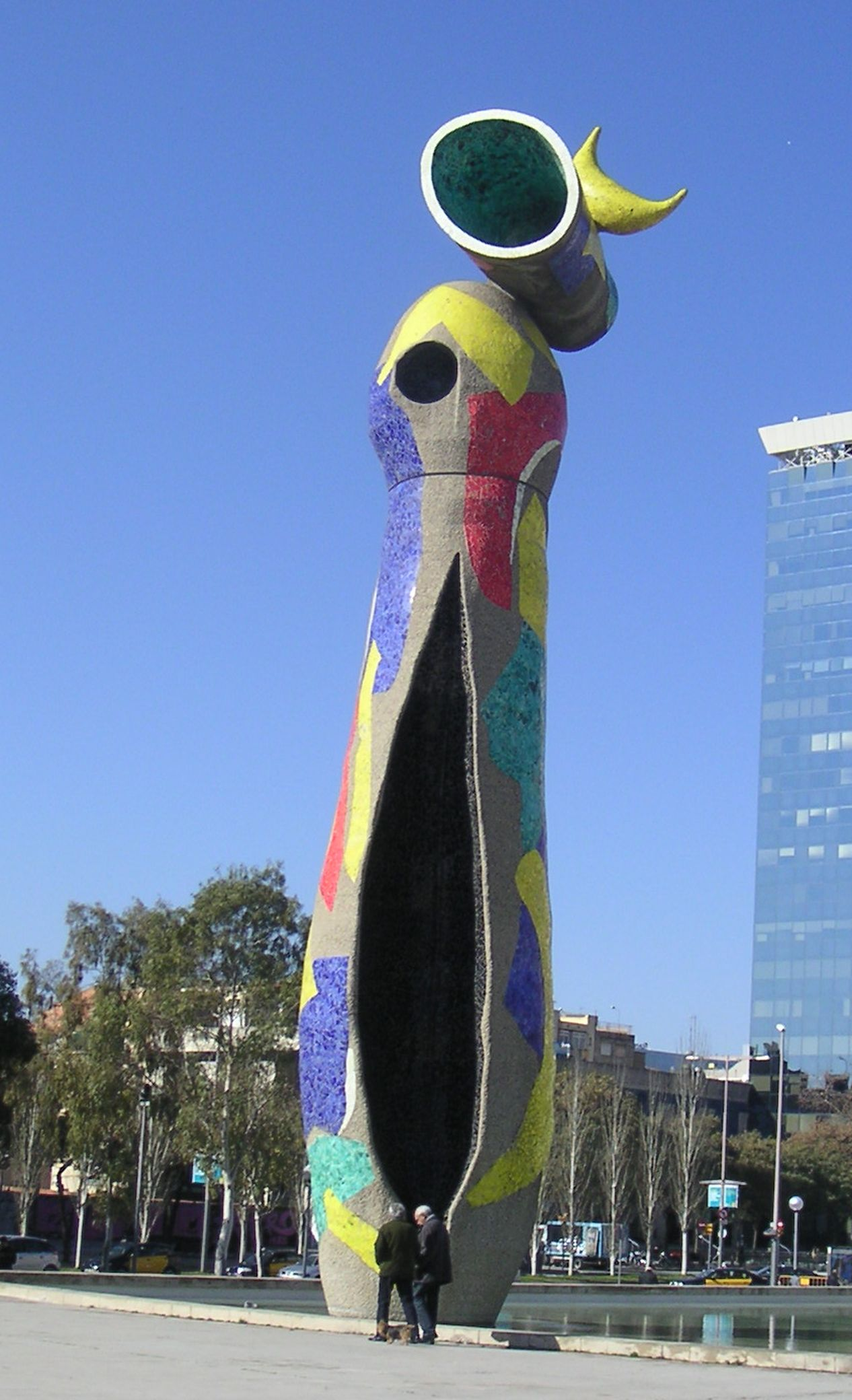 Estàtua "Dona i Ocell", de Joan Miró, al parc de l'Escorxador de Barcelona.